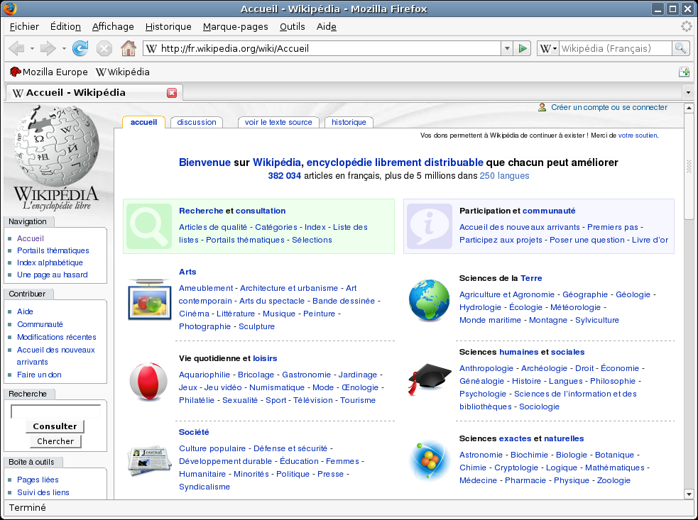 Capture d'écran de Mozilla Firefox 2.0 sous Gnome (Thème Industrial Tango)